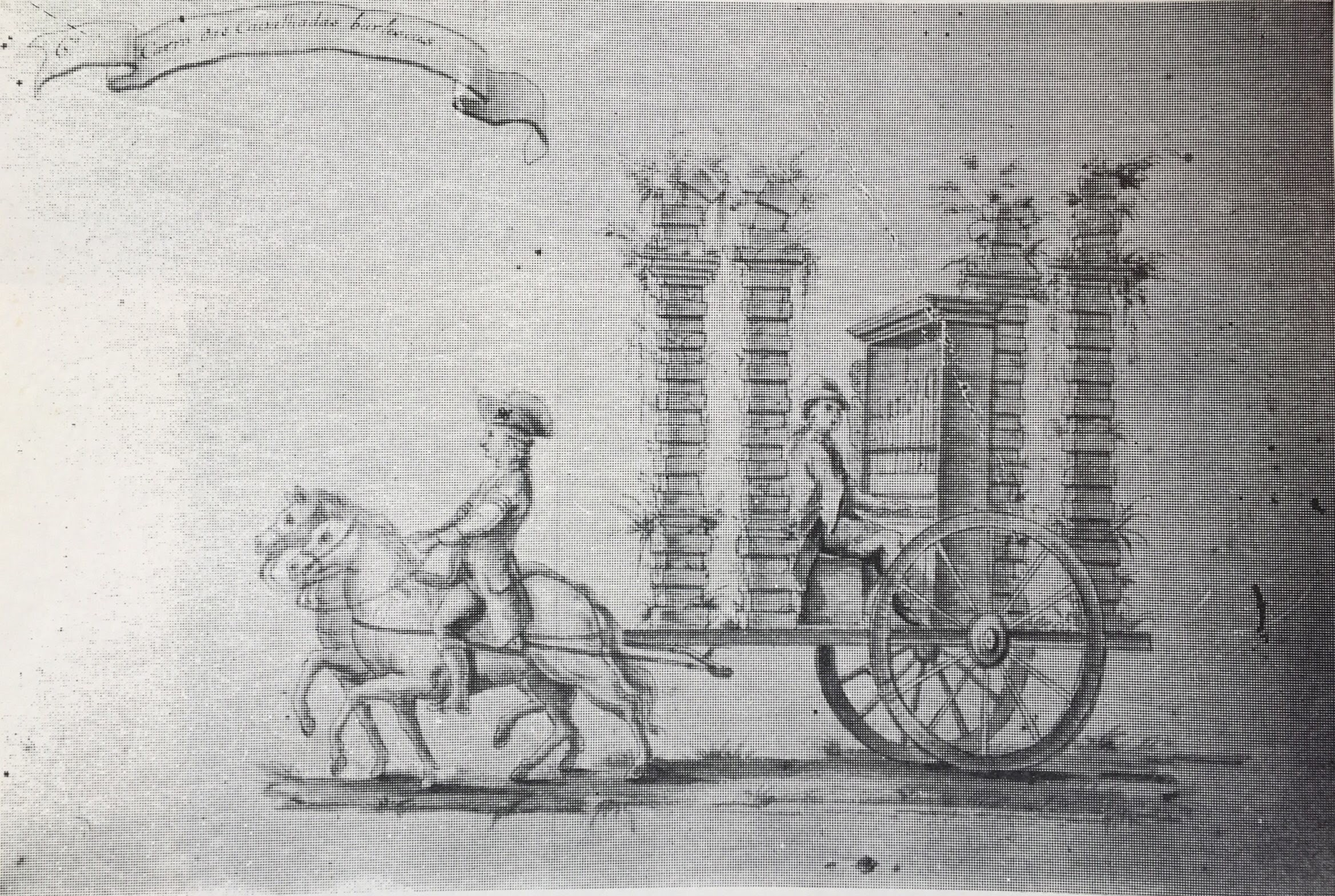 Desenho por Antônio Francisco Soares do carro alegórico "das cavalhadas burlescas" de Soares de 1786 para as festividades locais comemorativas do casamento dos Infantes de Portugal.